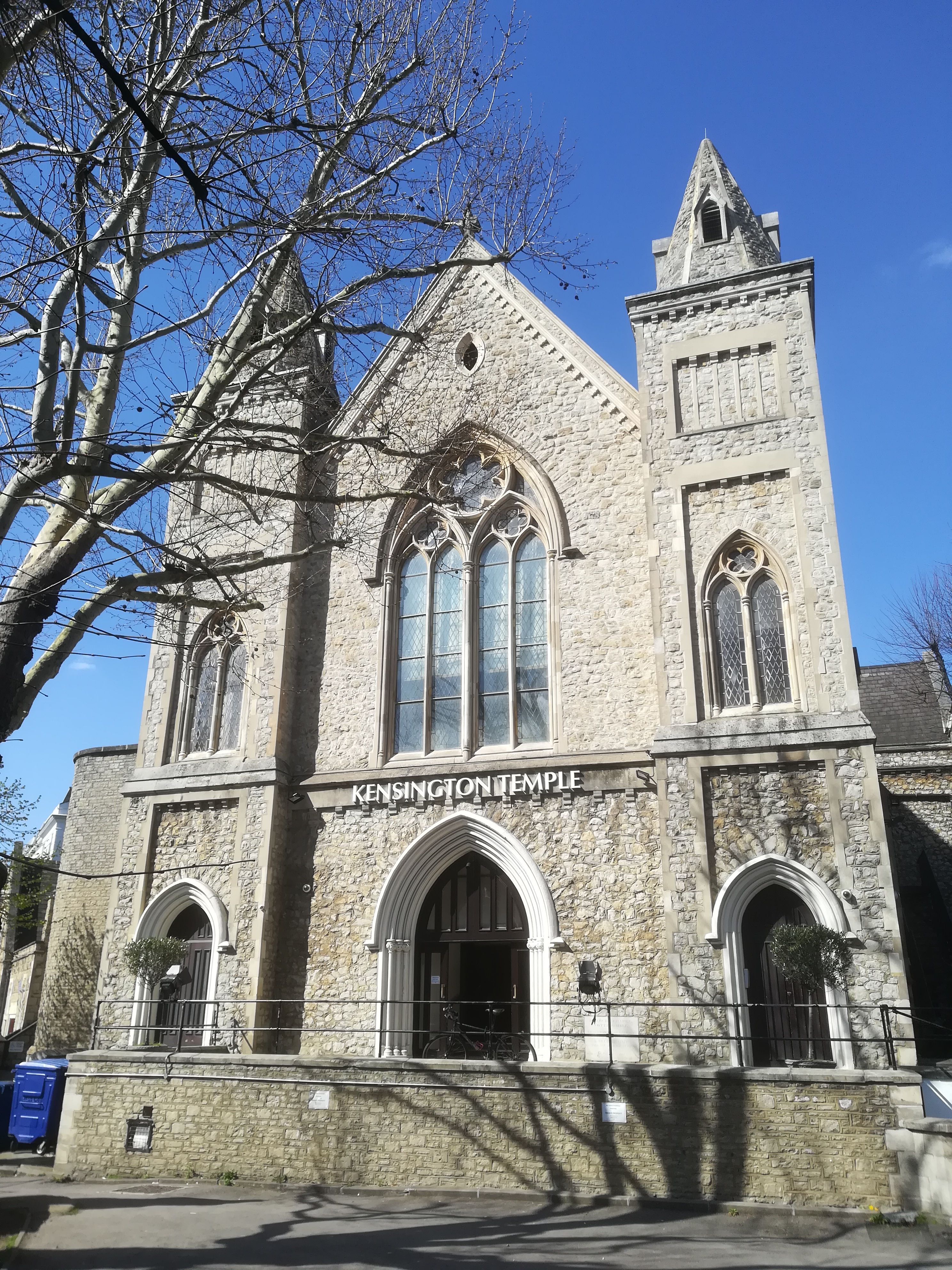 Świątynia Kensington w Notting Hill.